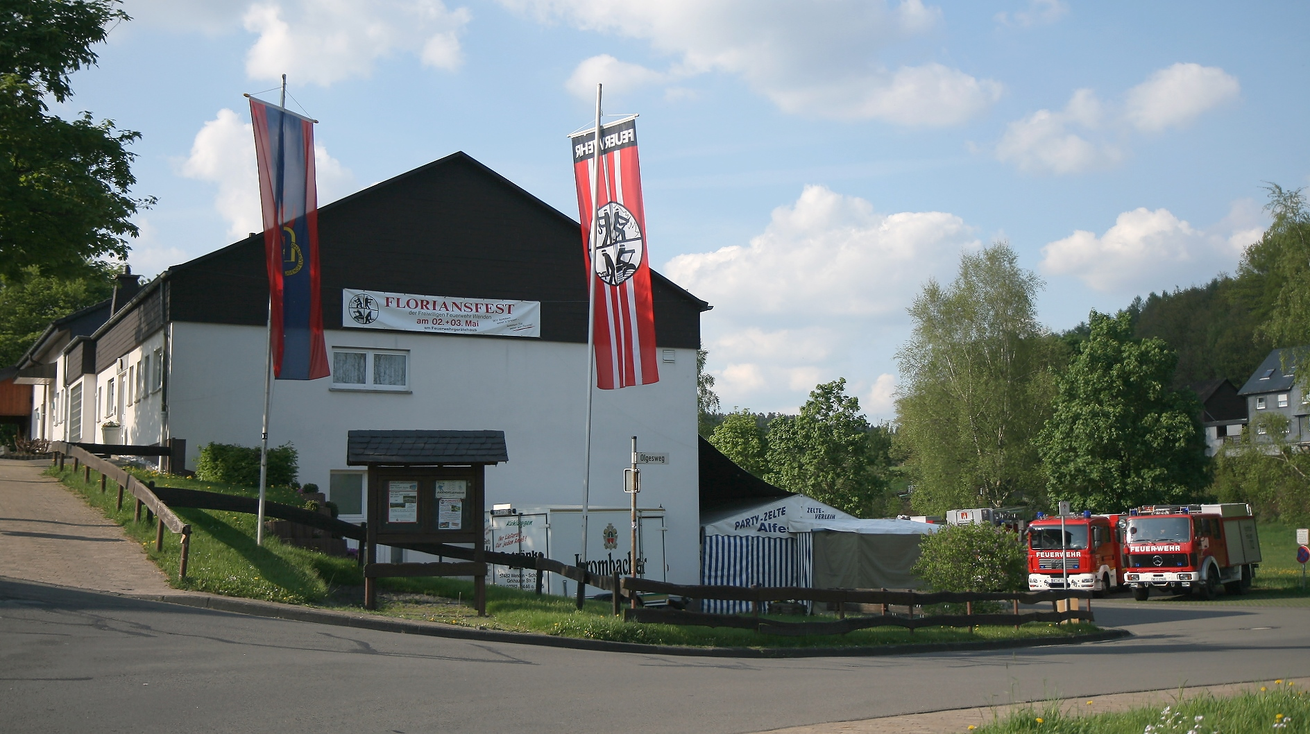 Feuerwehrgerätehaus der Feuerwehr in Wenden, Peter-Dassis-Ring 8.